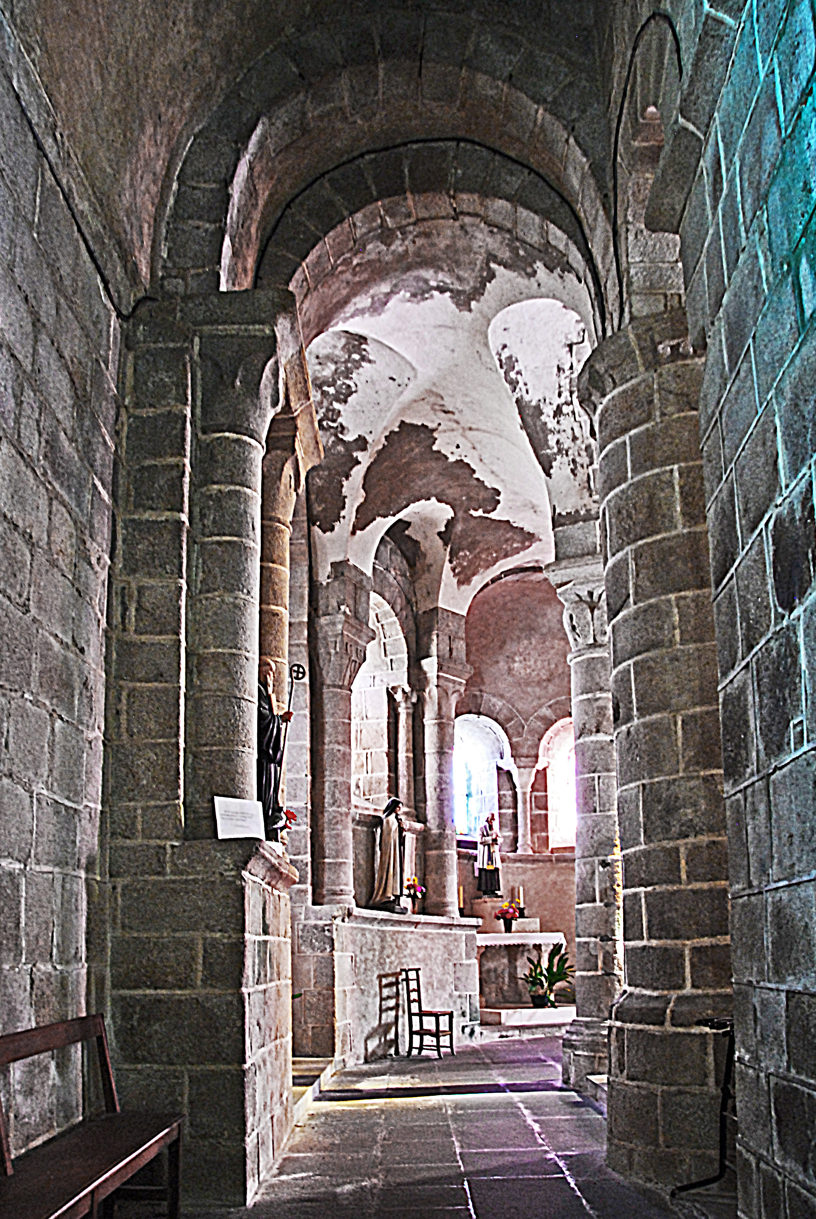 N.-D. de Châtel-Montagne, nördl. Chorumgang